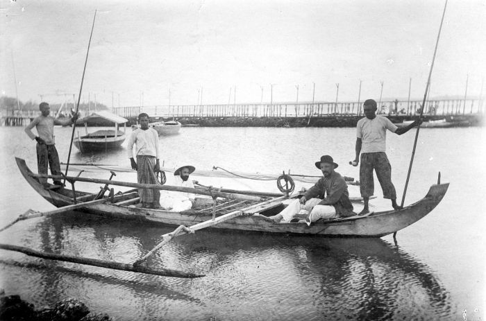 Repronegatief. Twee missionarissen in Inlandse prauw, Langgoer